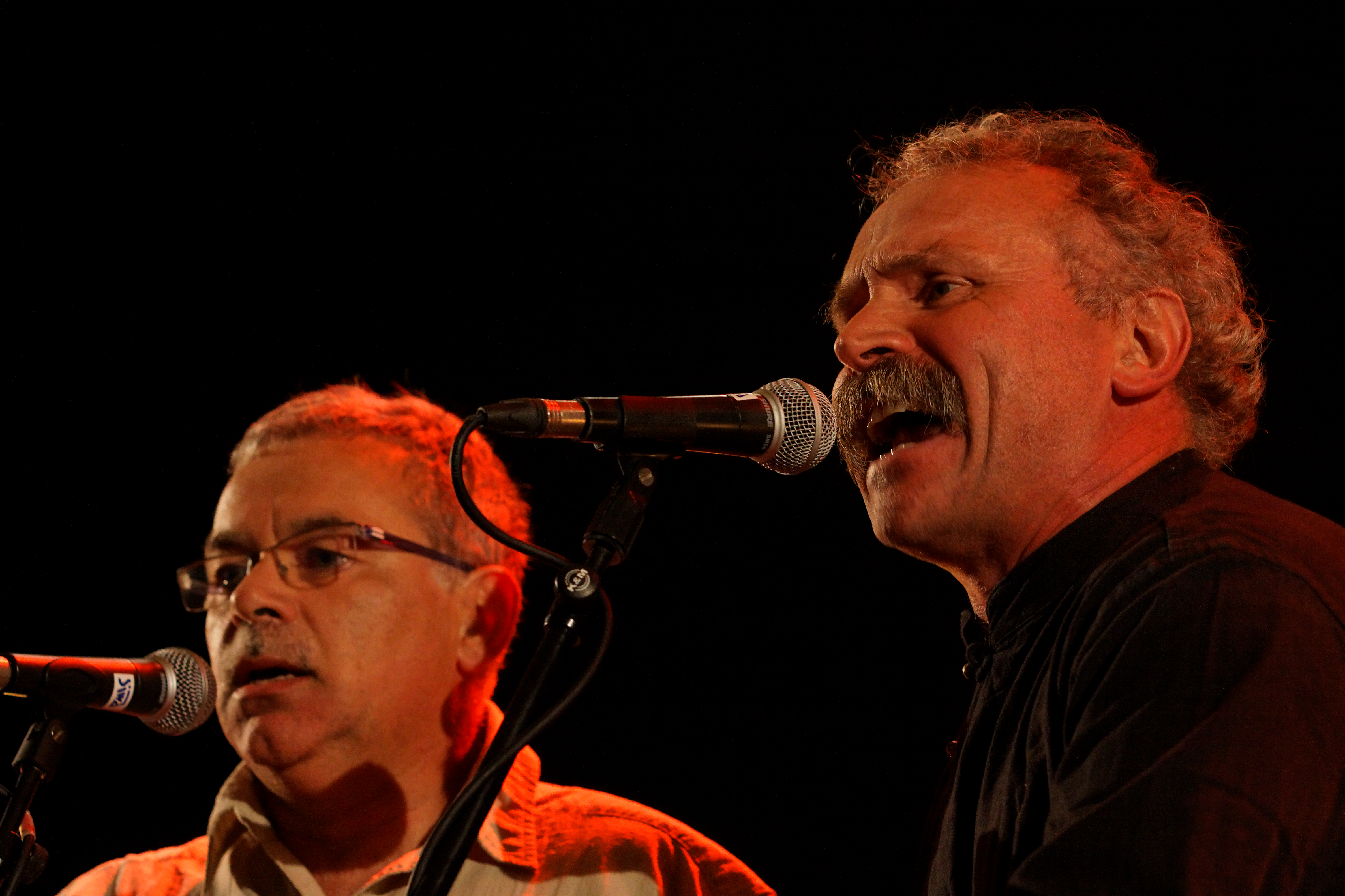 Les frère Quéré en concert le 22 juillet lors du festival de Cornouaille 2011.